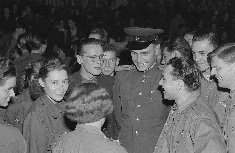 Original image description from the Deutsche FotothekPublikum einer Veranstaltung zum Gedenken an die Völkerschlacht